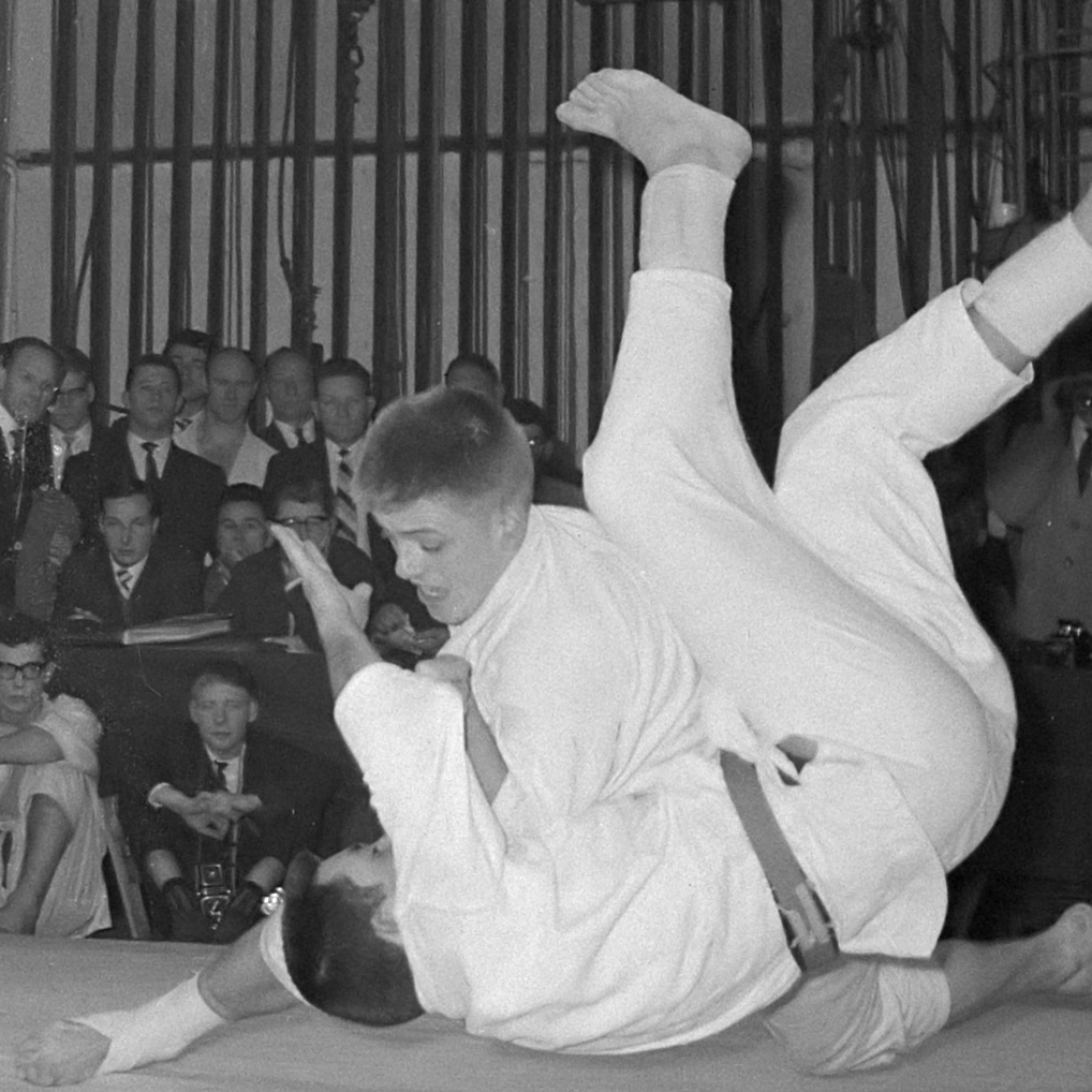 Nederlandse judokampioenschappen te Amsterdam, J. Gouweleeuw werpt C. Zappey 29 januari 1961